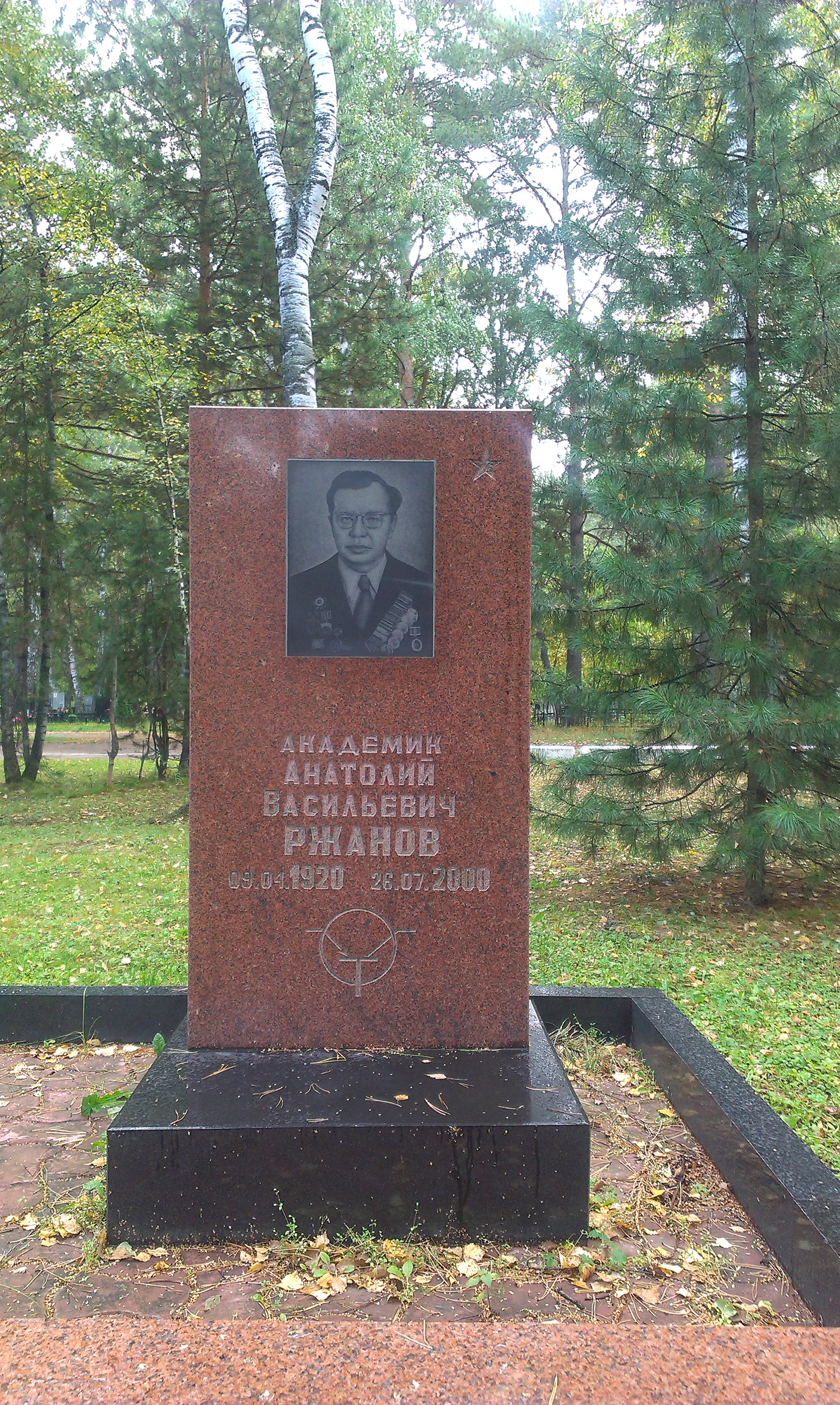 Южное (Чербузинское) кладбище